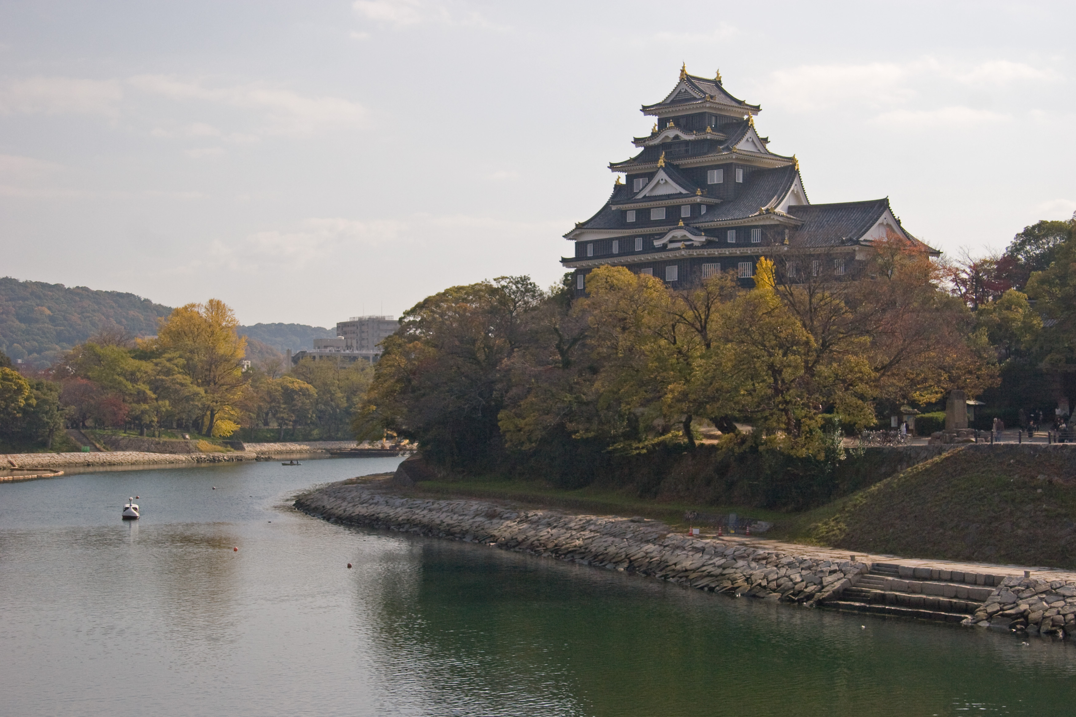 Okayama Castle, Japan